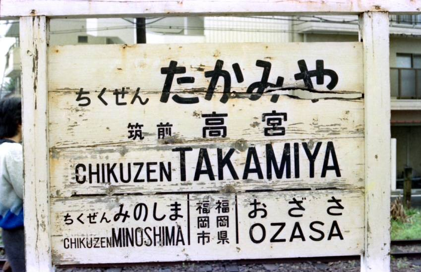 国鉄筑肥線筑前高宮駅